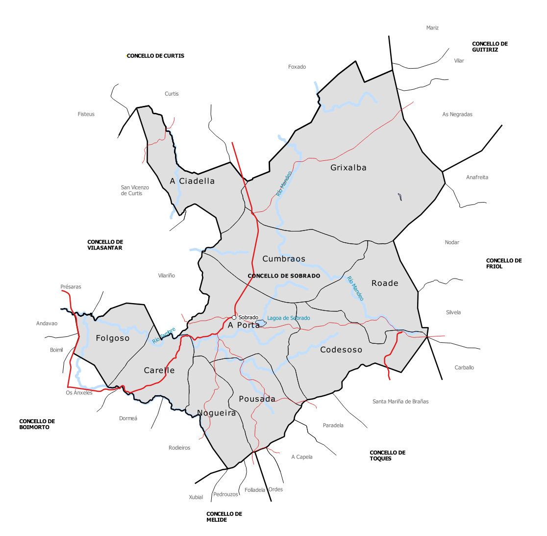 Mapa de parroquias do concello de Sobrado.